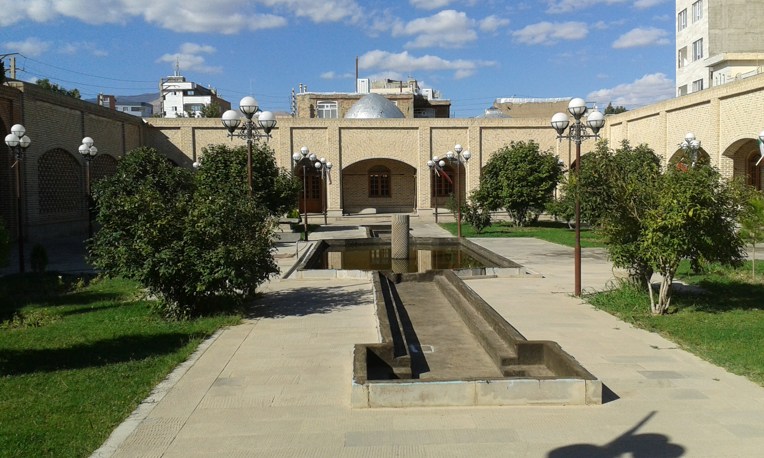 بقعه شیخ محمود شبستری